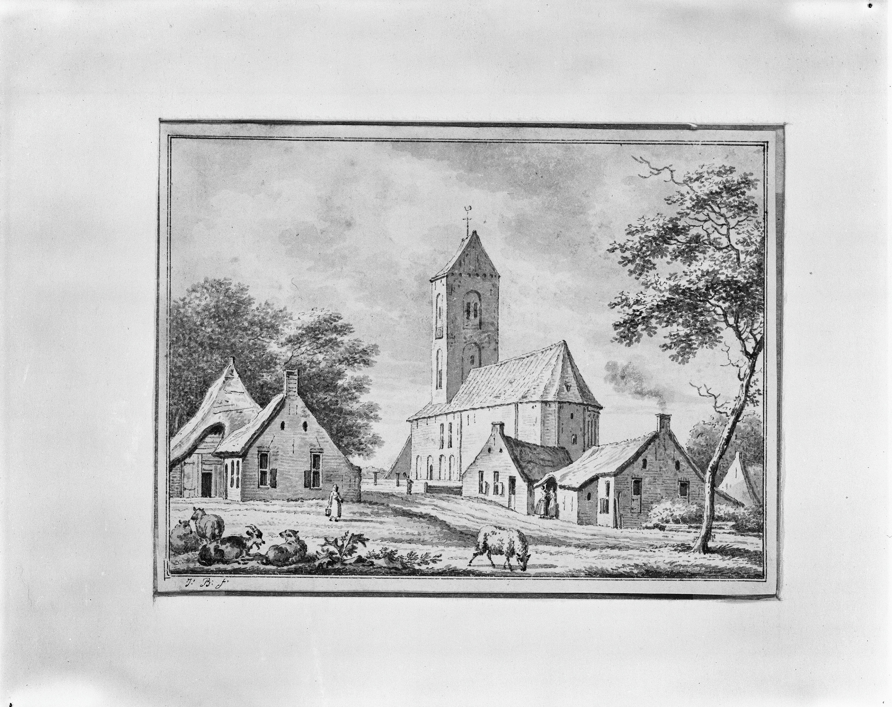 Nederlands Hervormde Kerk: tekening door J.Bulthuis 1791